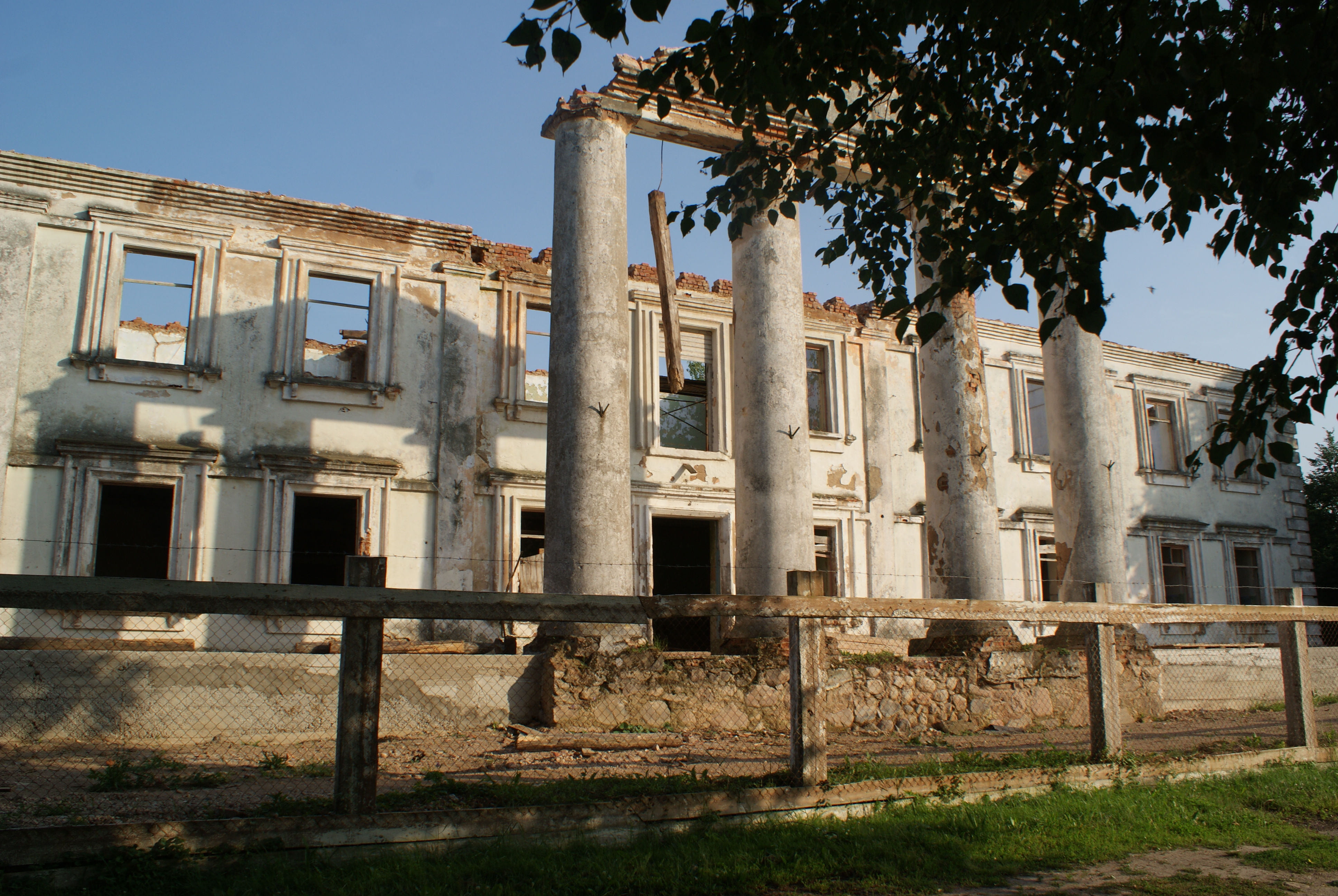 Маёнтак у Грозава be:Капыльскі раён